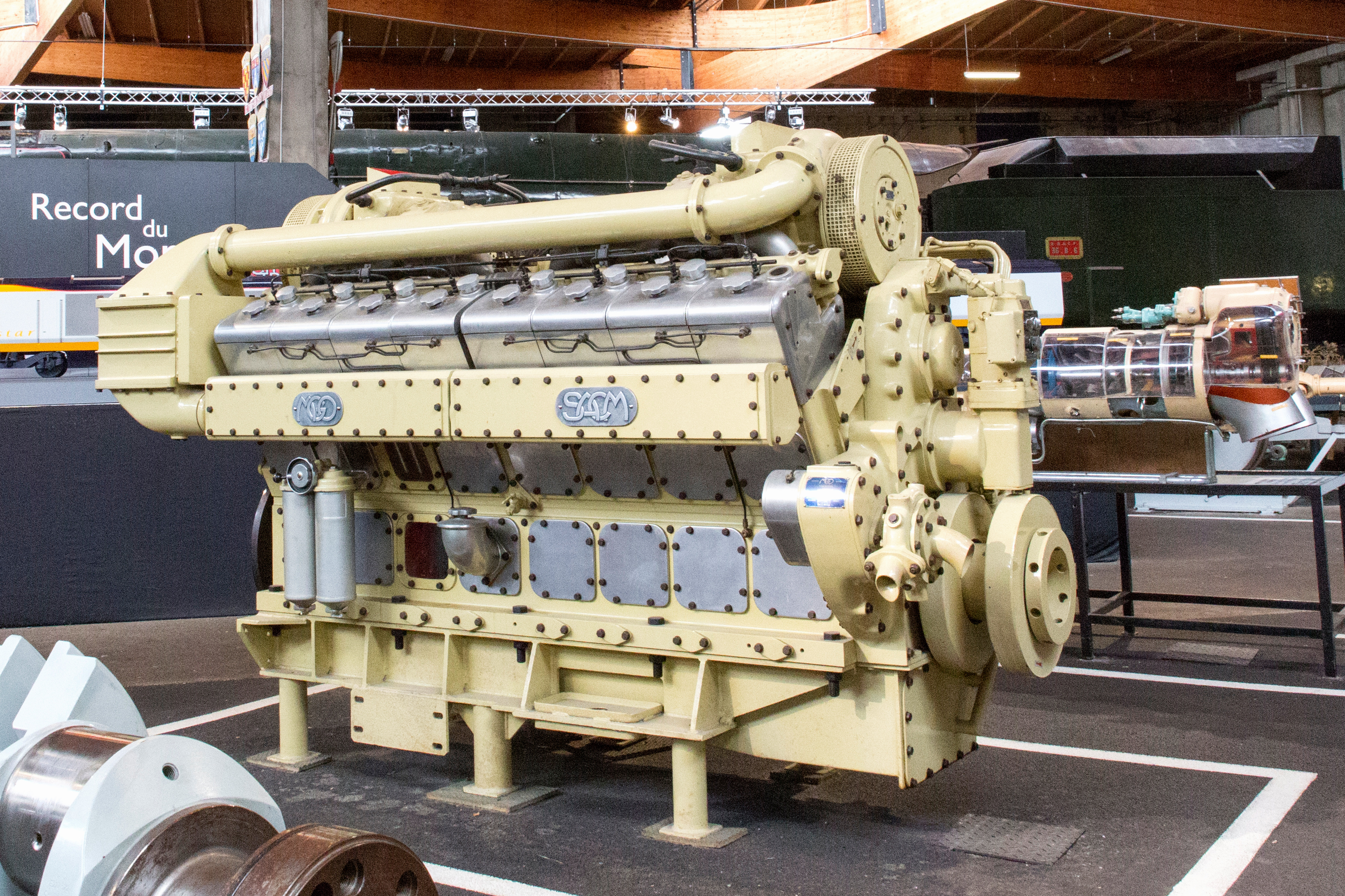 Moteur SACM AGO V16 ESHR des CC 72000.